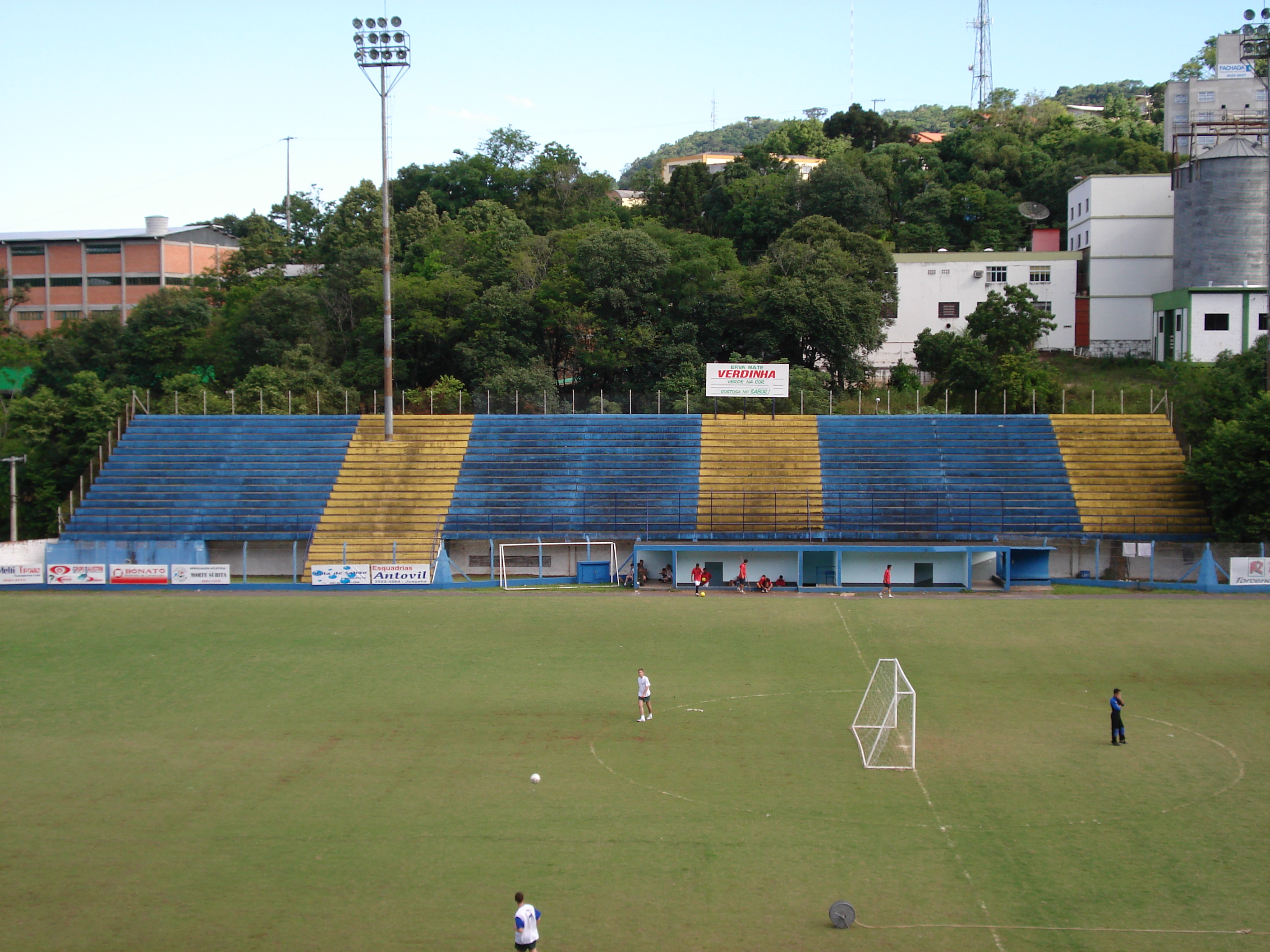 Da Nova stadium on Joaçaba-SC-Brazil